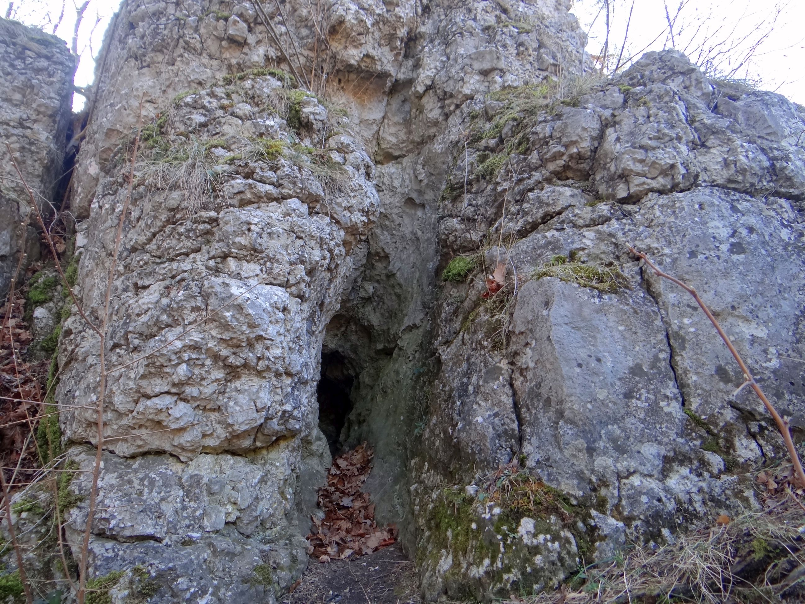 Jaskinia